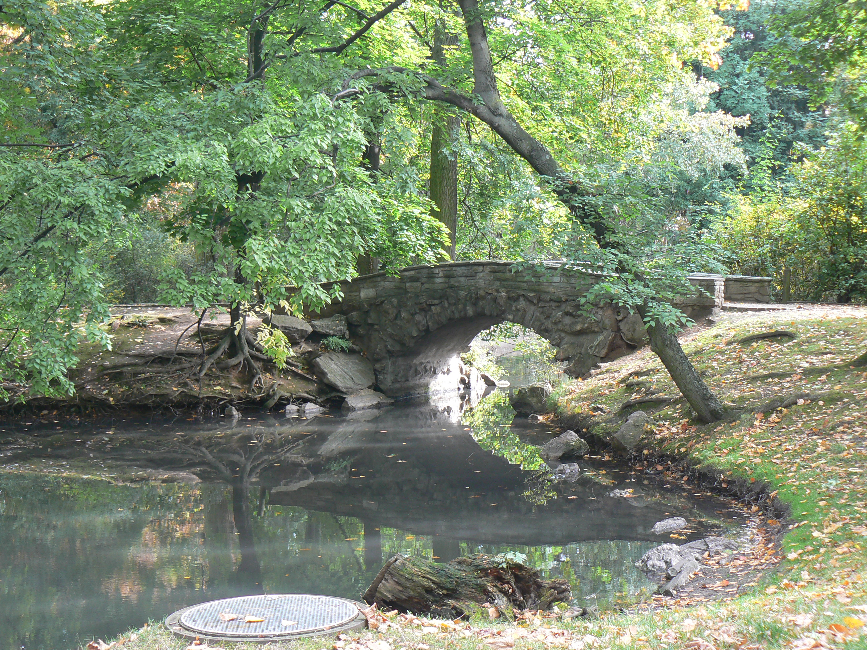 hist.Brücke im ehem. Schlosspark des Bernus-Parks